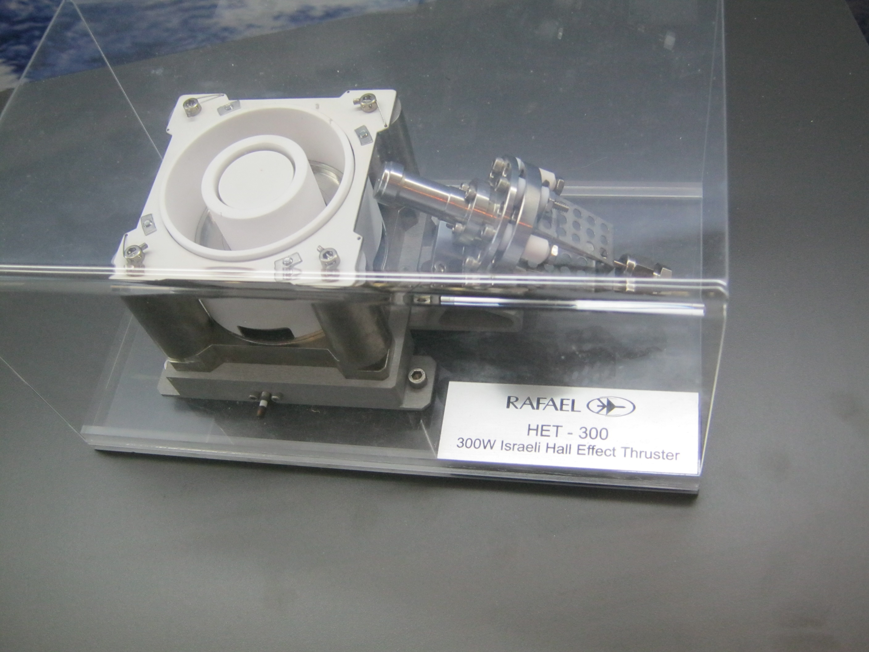 Hall effect thruster of spacecraft VENμS. IAC 2015